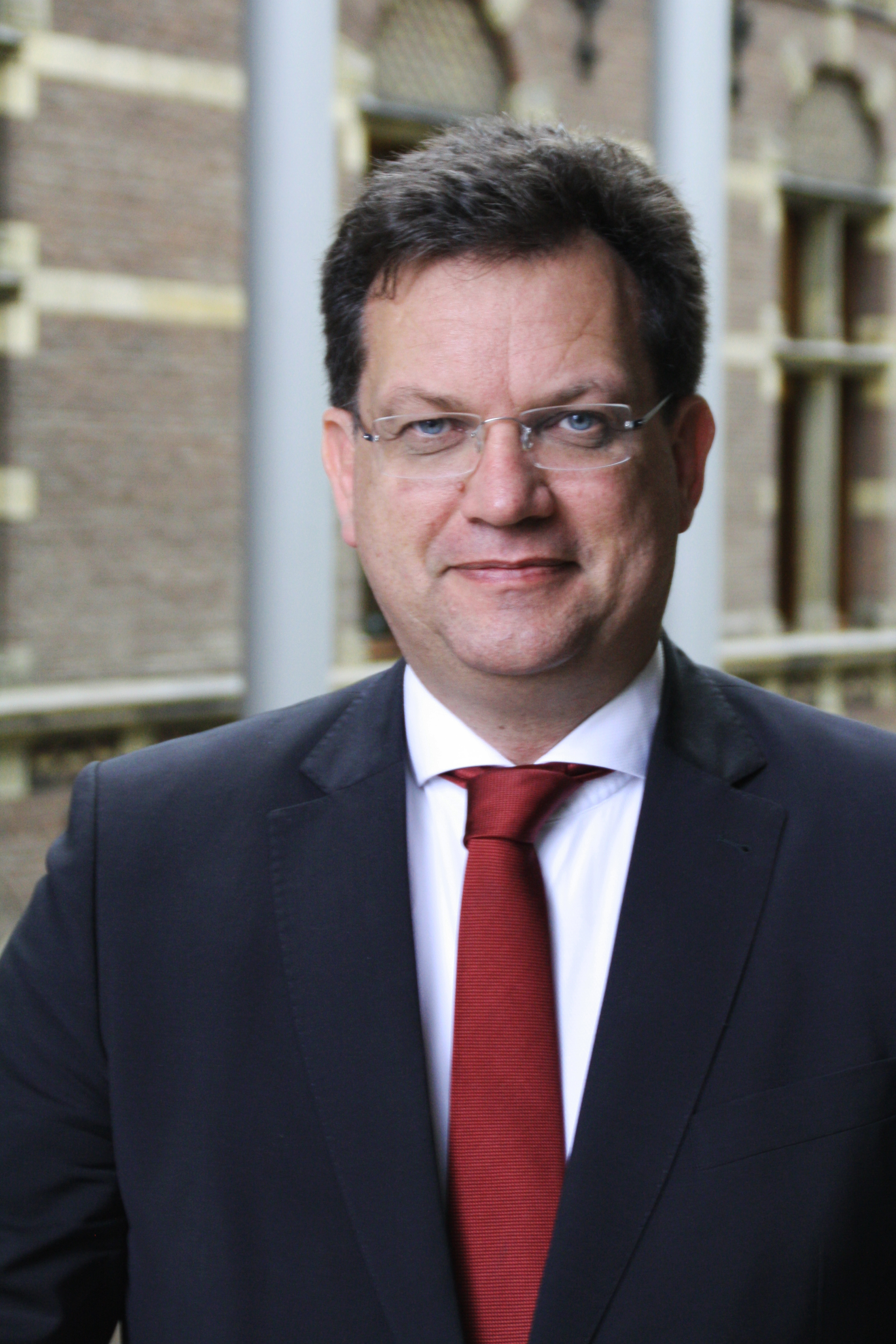 Jaco Geurts